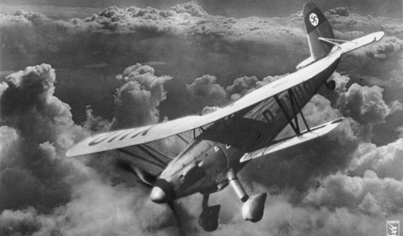 Arado Ar 68 Klinke & Co. 13482